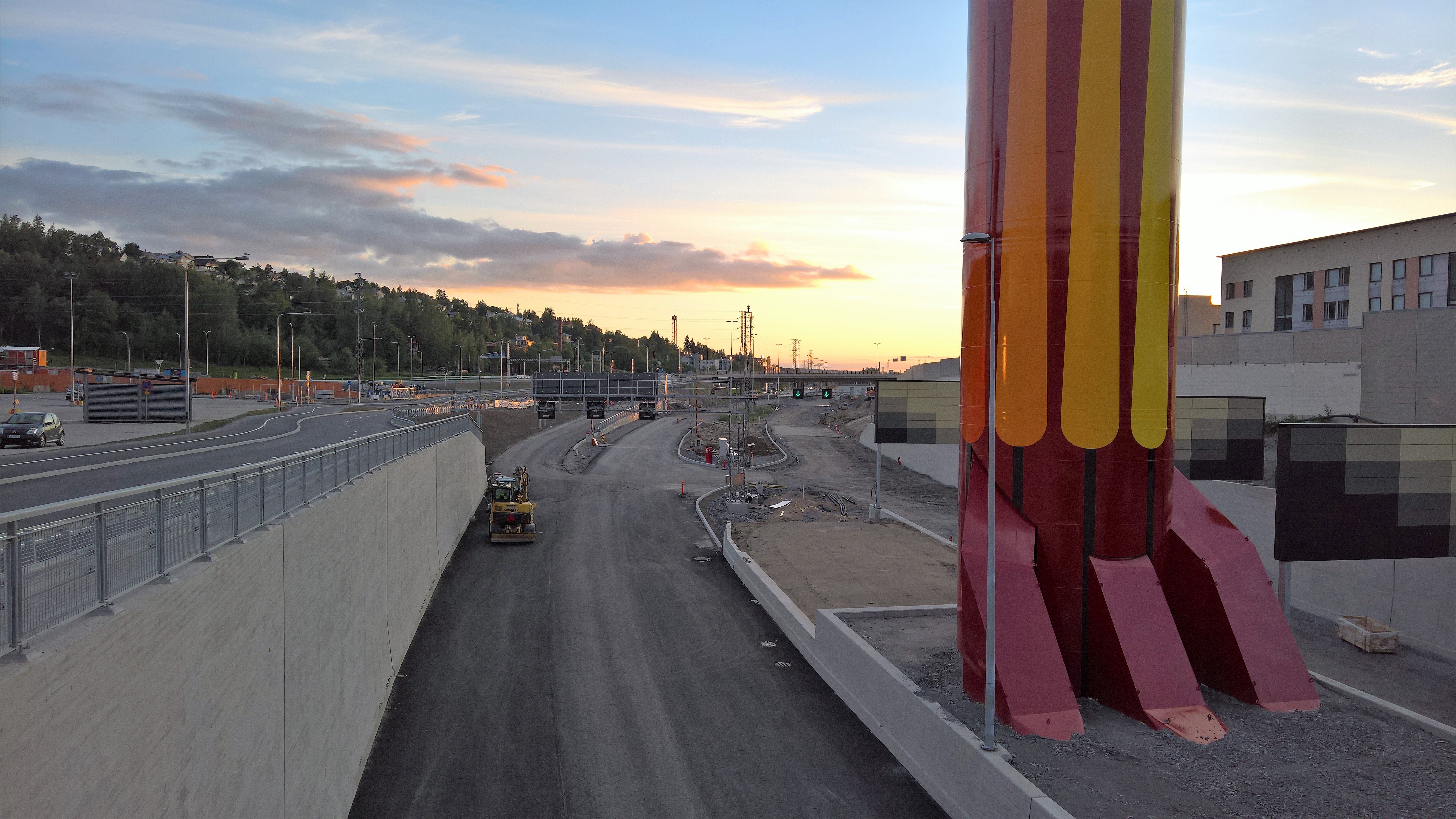 Tampereen Rantatunnelin Santalahden suuaukko sen yläpuolelta Haarlankadulta kuvattuna. Vasemmalla Pispalanharju.